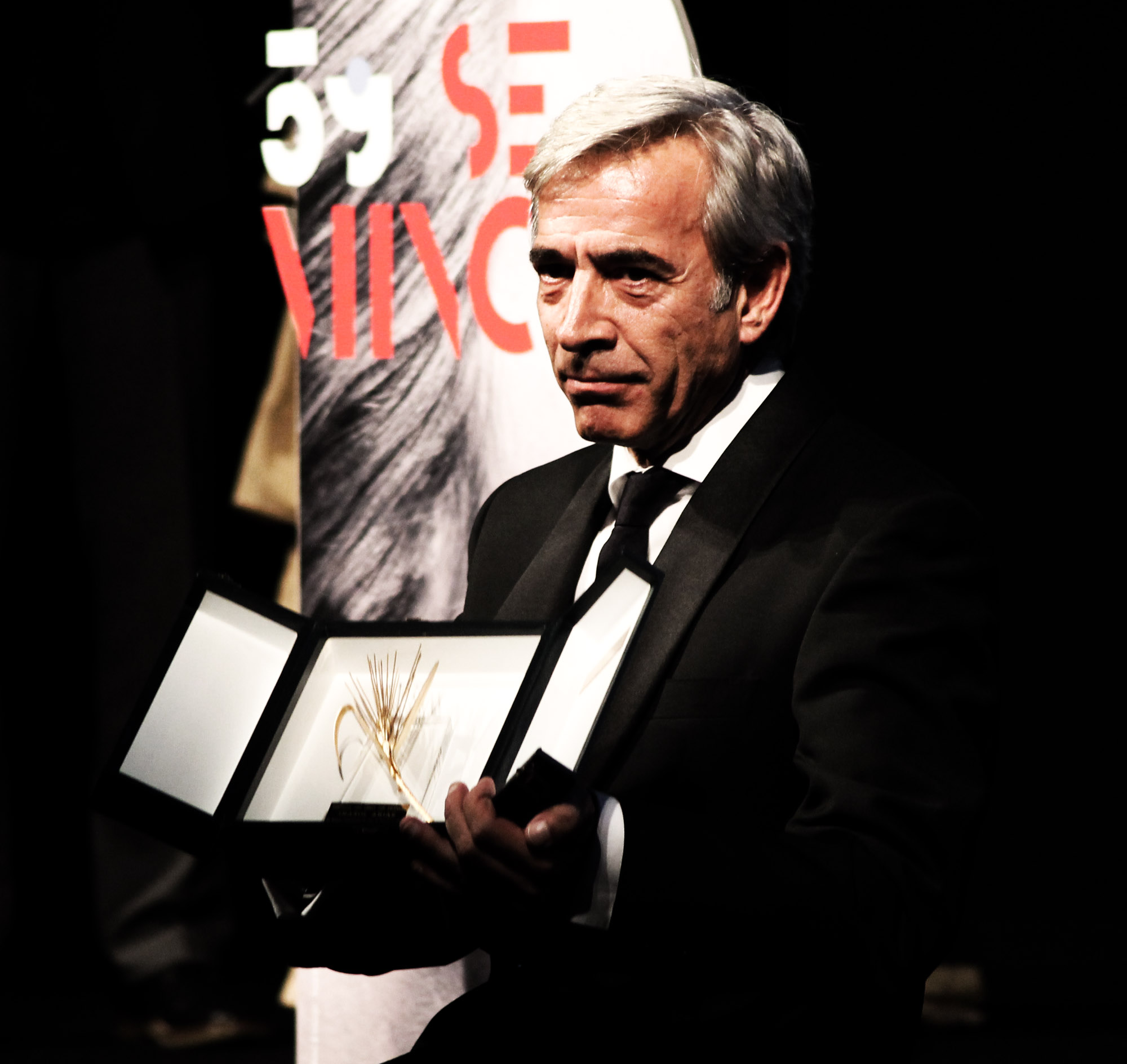 Imanol Arias recibe la Espiga de Honor de la Seminci